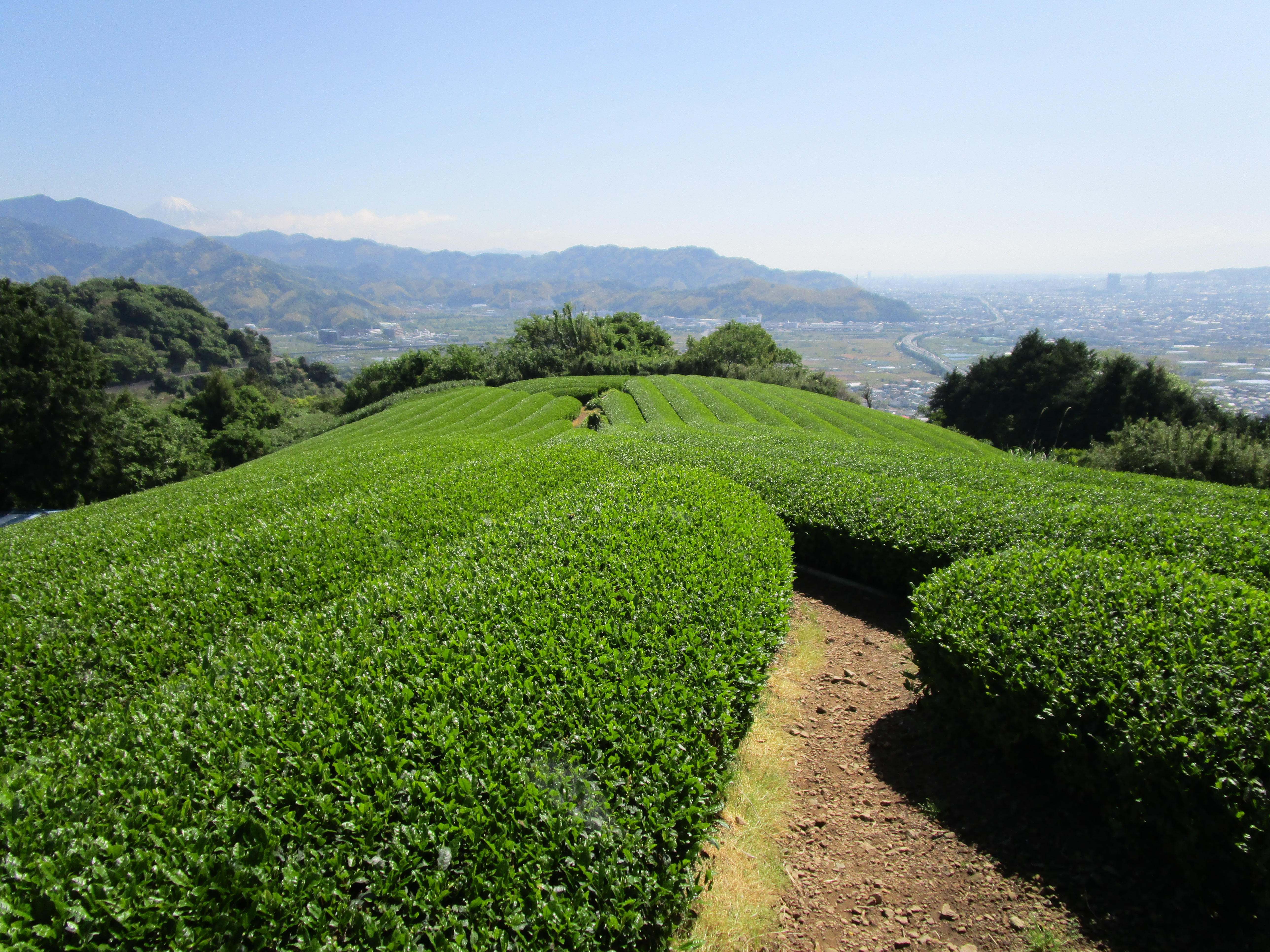 賎機山ハイキング